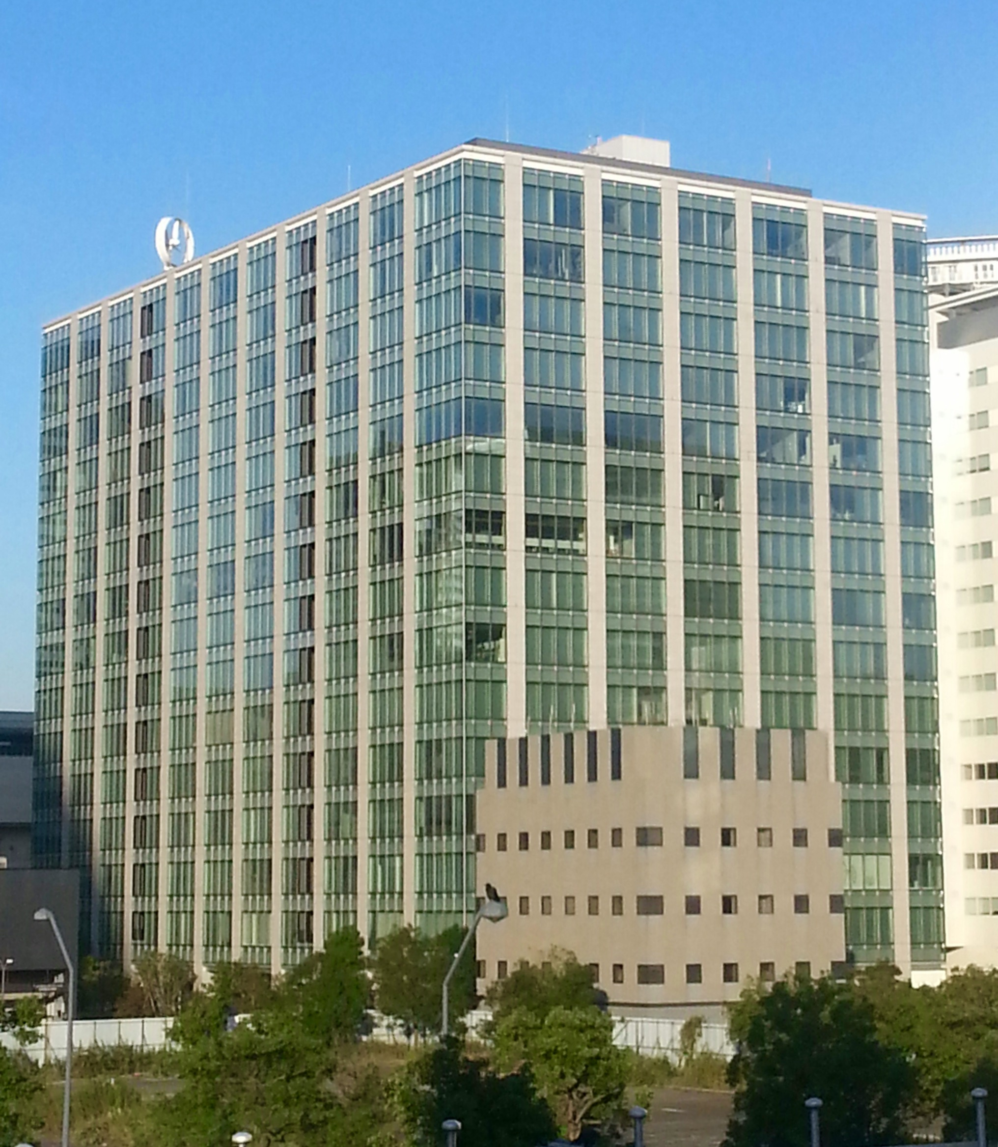 横浜みなとみらい地区にあるMMパークビル。屋上には小型風力発電機を設置している。下部の建物は神奈川県警みなとみらい分庁舎。